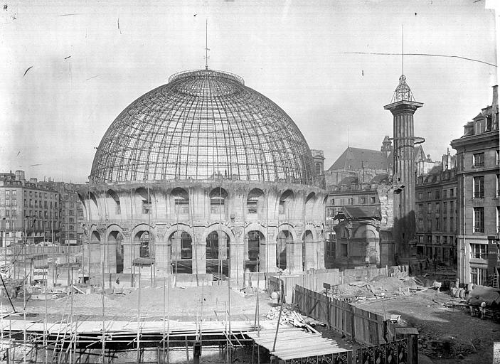 Vue d'ensemble en cours de construction